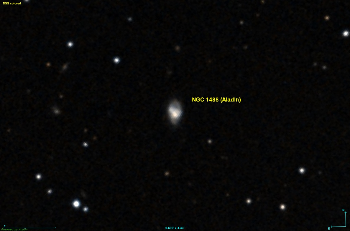 Image réalisée avec les données de DSS (Digitized Sky Survey) et le logiciel Aladin